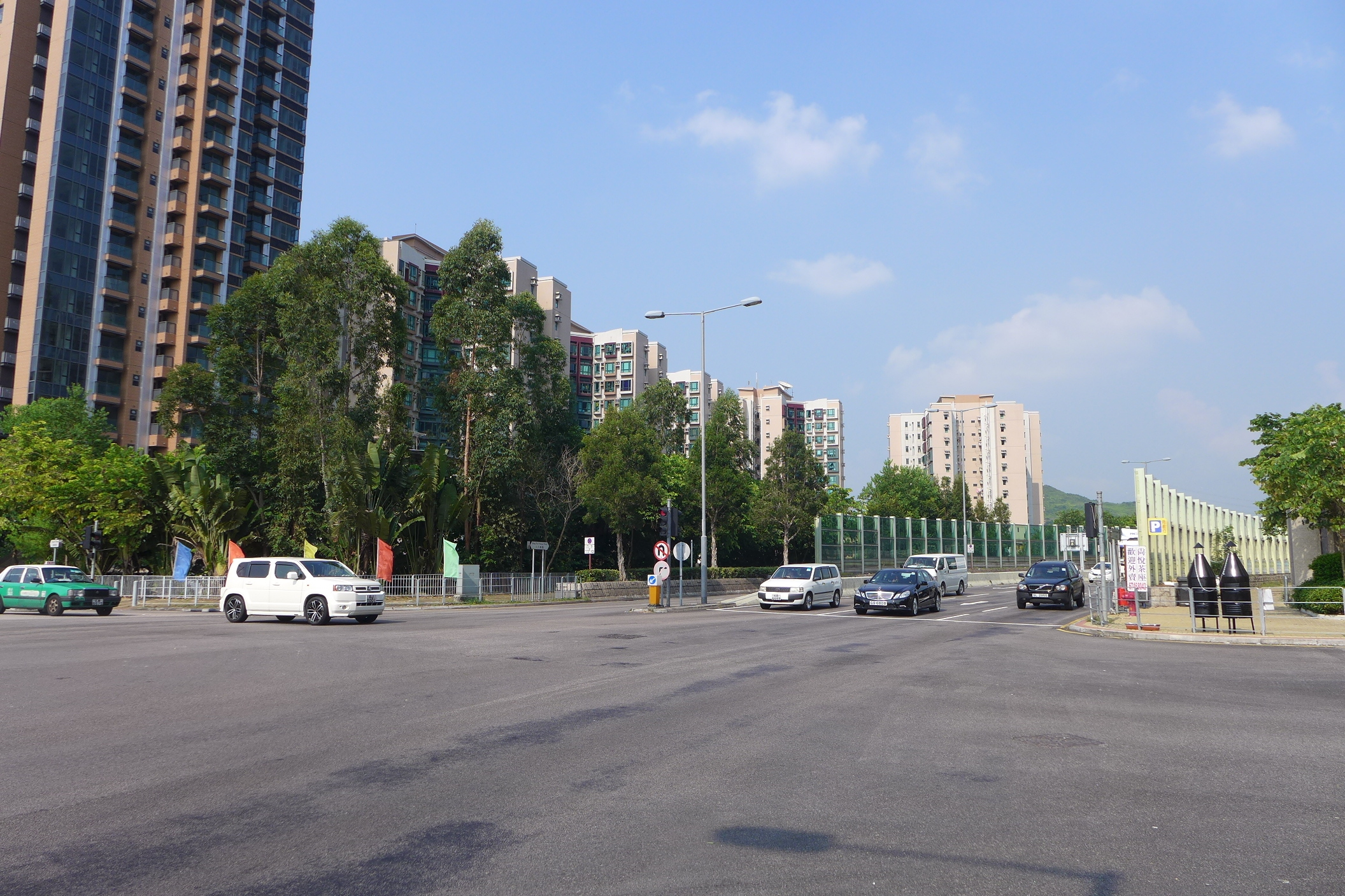 Shap Pat Heung Road